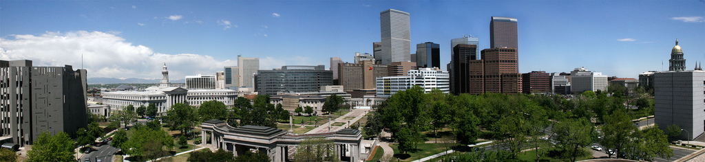 Denver Colorado Skyline